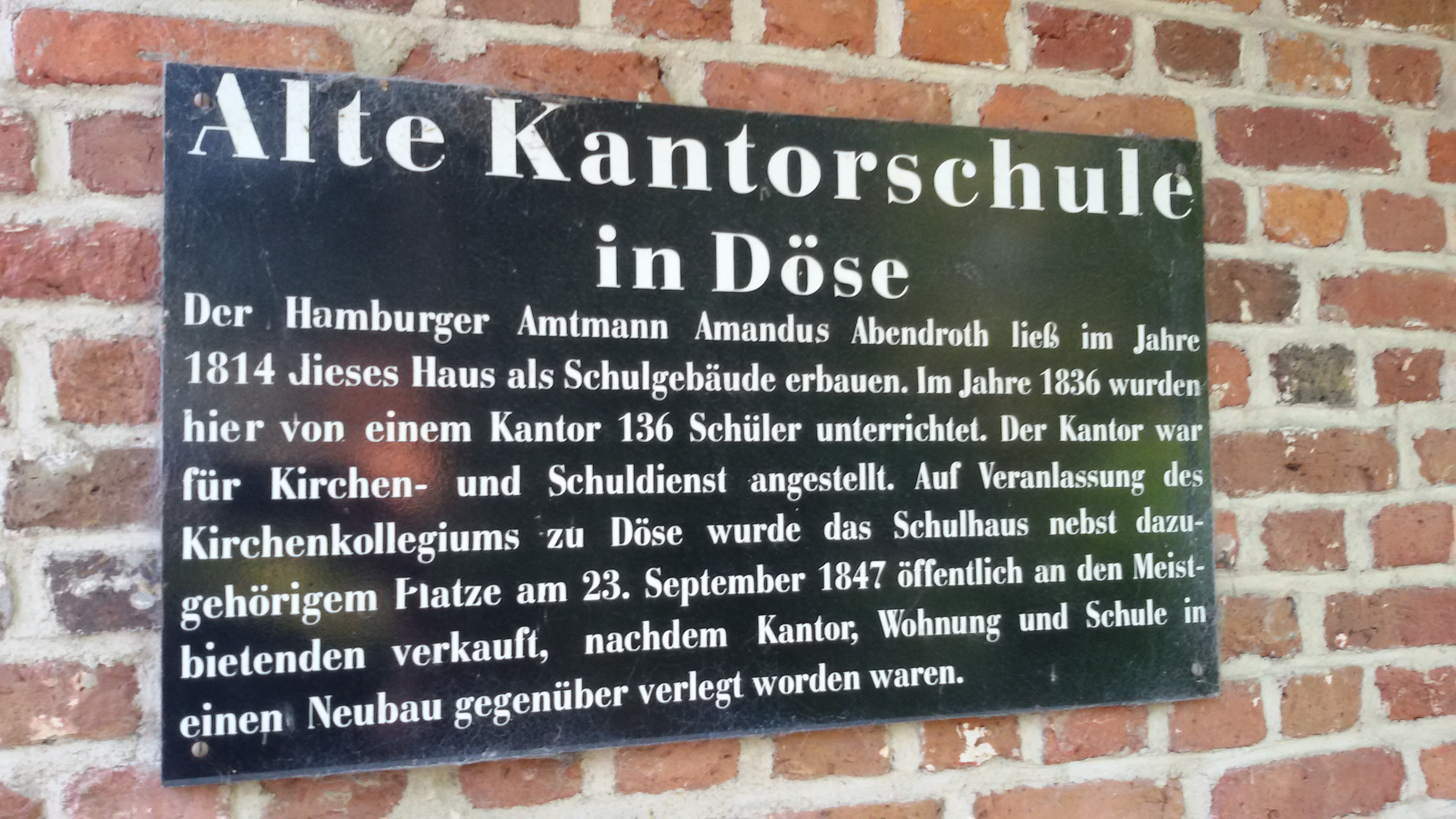 Schild an der Alten Kantorschule in Cuxhaven-Döse. "Alte Kantorschule in Döse. Der Hamburger Amtmann Amandus Abendroth ließ im Jahre 1814 dieses Haus als Schulgebäude erbauen. Im Jahre 1836 wurden hier von einem Kantor 136 Schüler unterrichtet. Der Kantor war für Kirchen- und Schuldienst angestellt. Auf Veranlassung des Kirchenkollegiums zu Döse wurde das Schulhaus nebst dazugehörigem Platze am 23. September 1847 öffentlich an den Meistbietenden verkauft, nachdem Kantor, Wohnung und Schule in einen Neubau gegenüber verlegt worden waren."